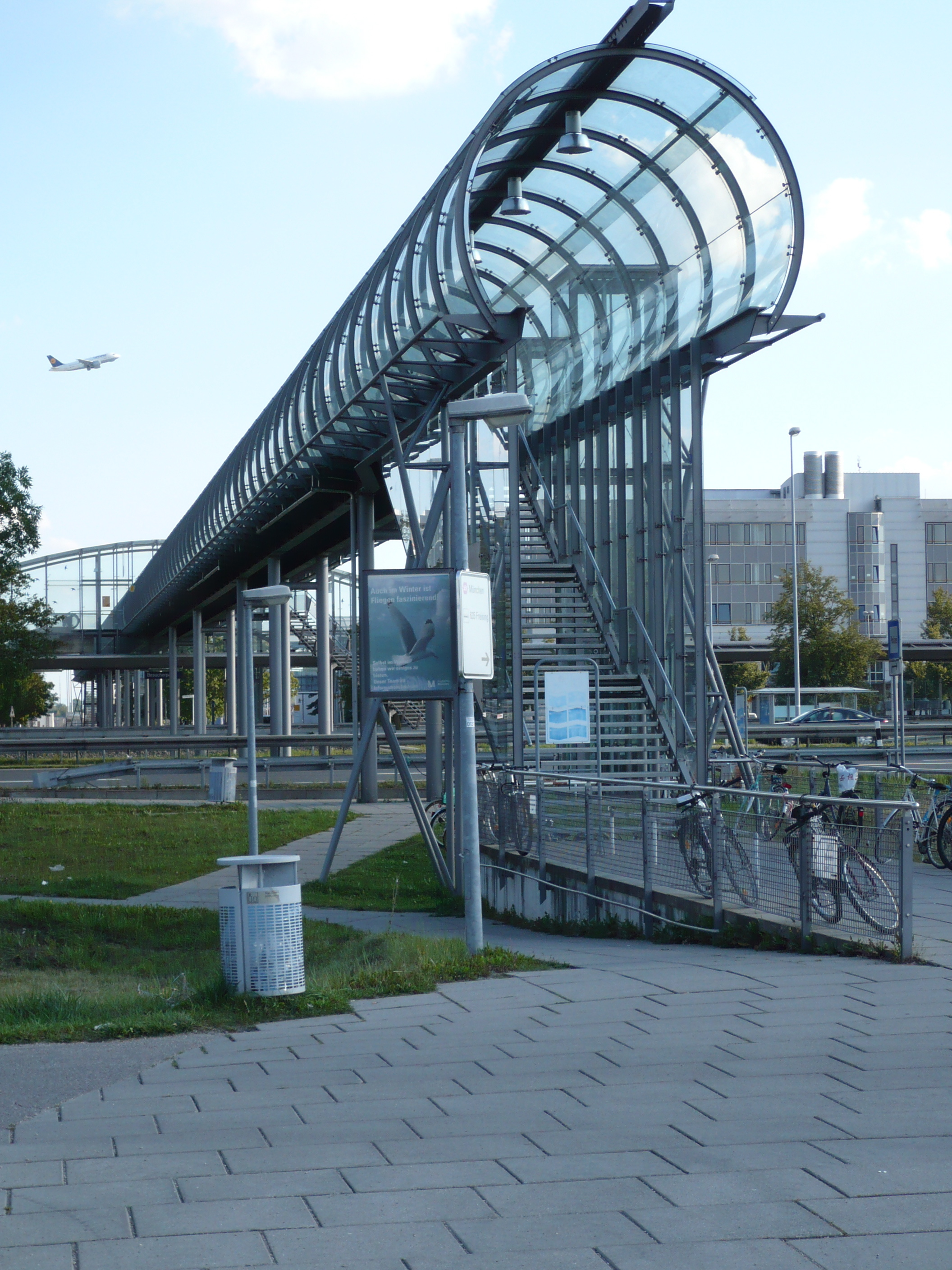 Fußgängerbrücke der S-Bahn-Haltestelle Besucherpark am Flughafen München